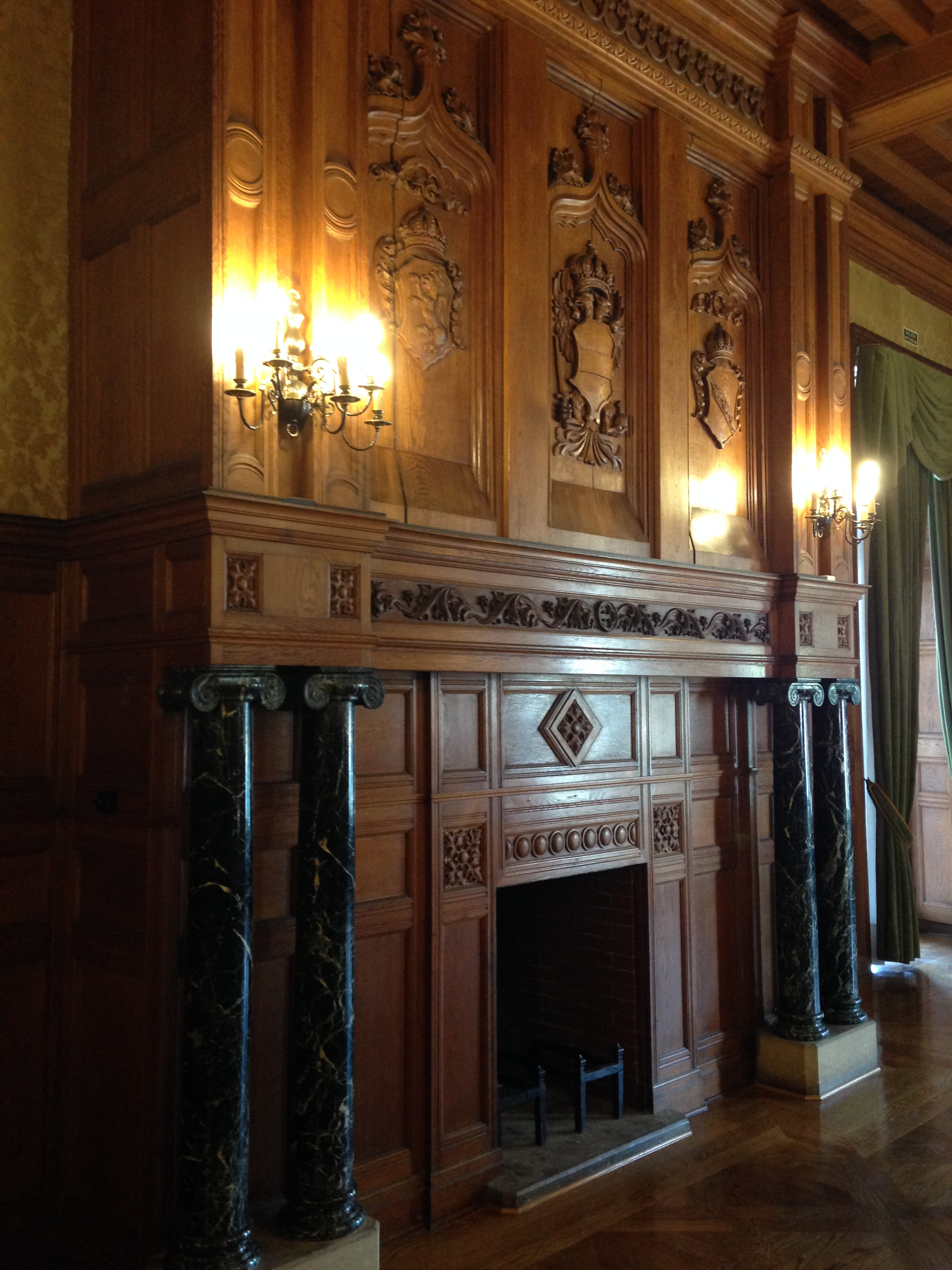 Miramar jauregiko barnealdea: Zurezko Aretoko tximinia